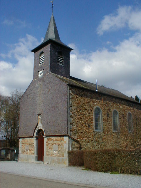 Walon: Broûli d' Peche : eglijhe